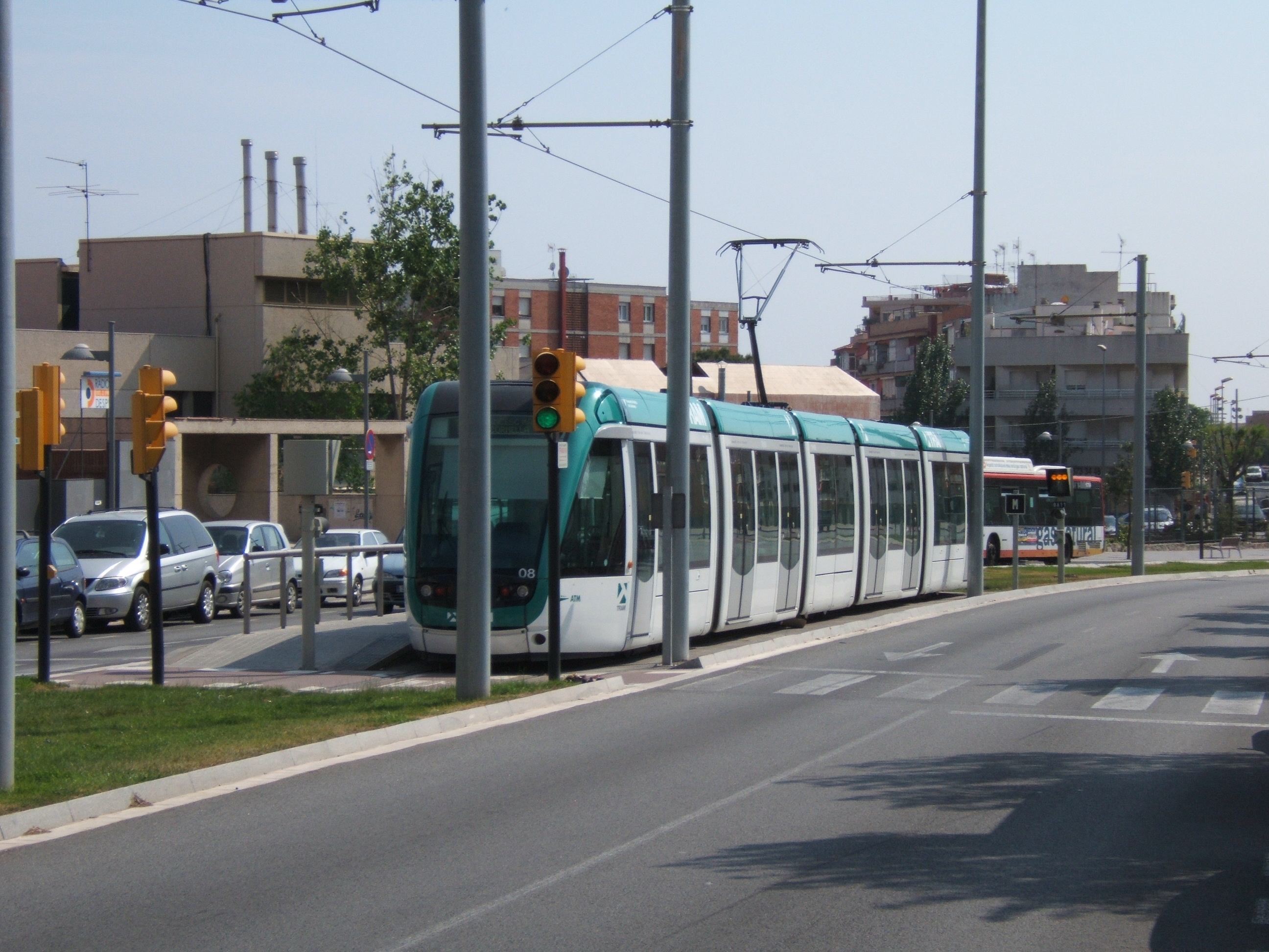 Het Trambaix tramsysteem in Barcelona